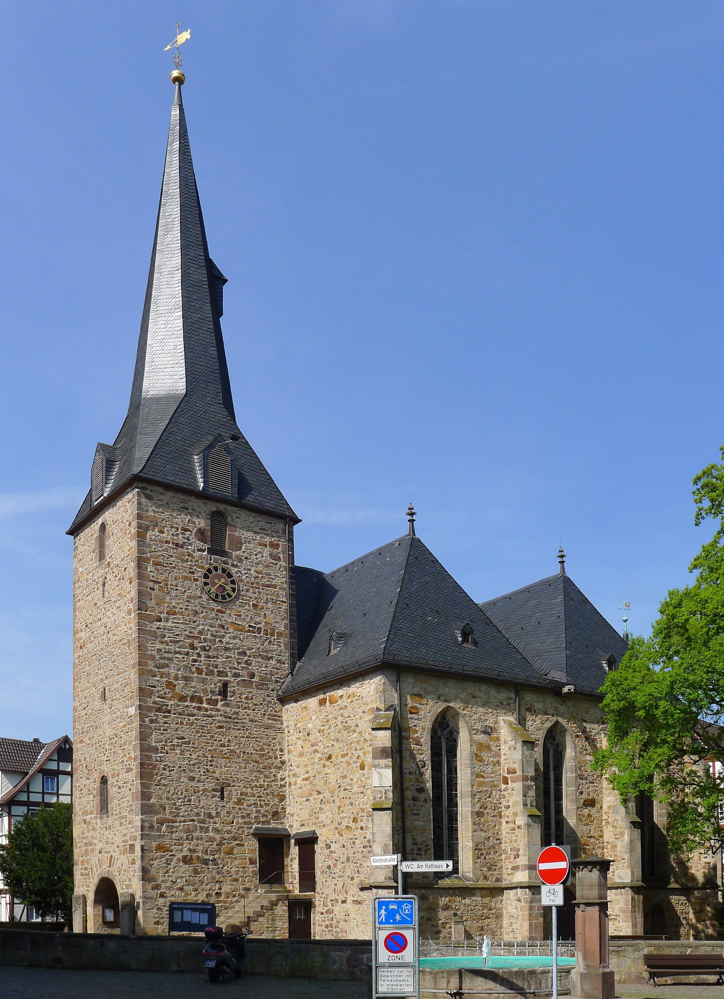 Blick auf Turm und Kirchenschiff